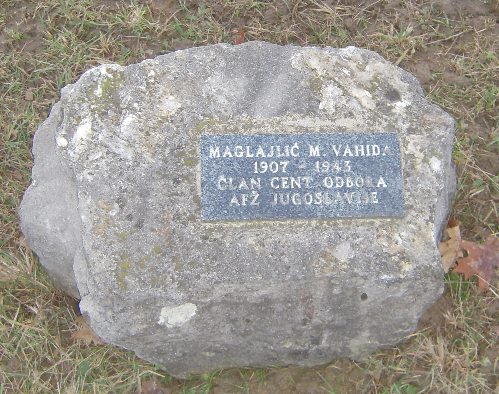 Маглајлић_Вахида.